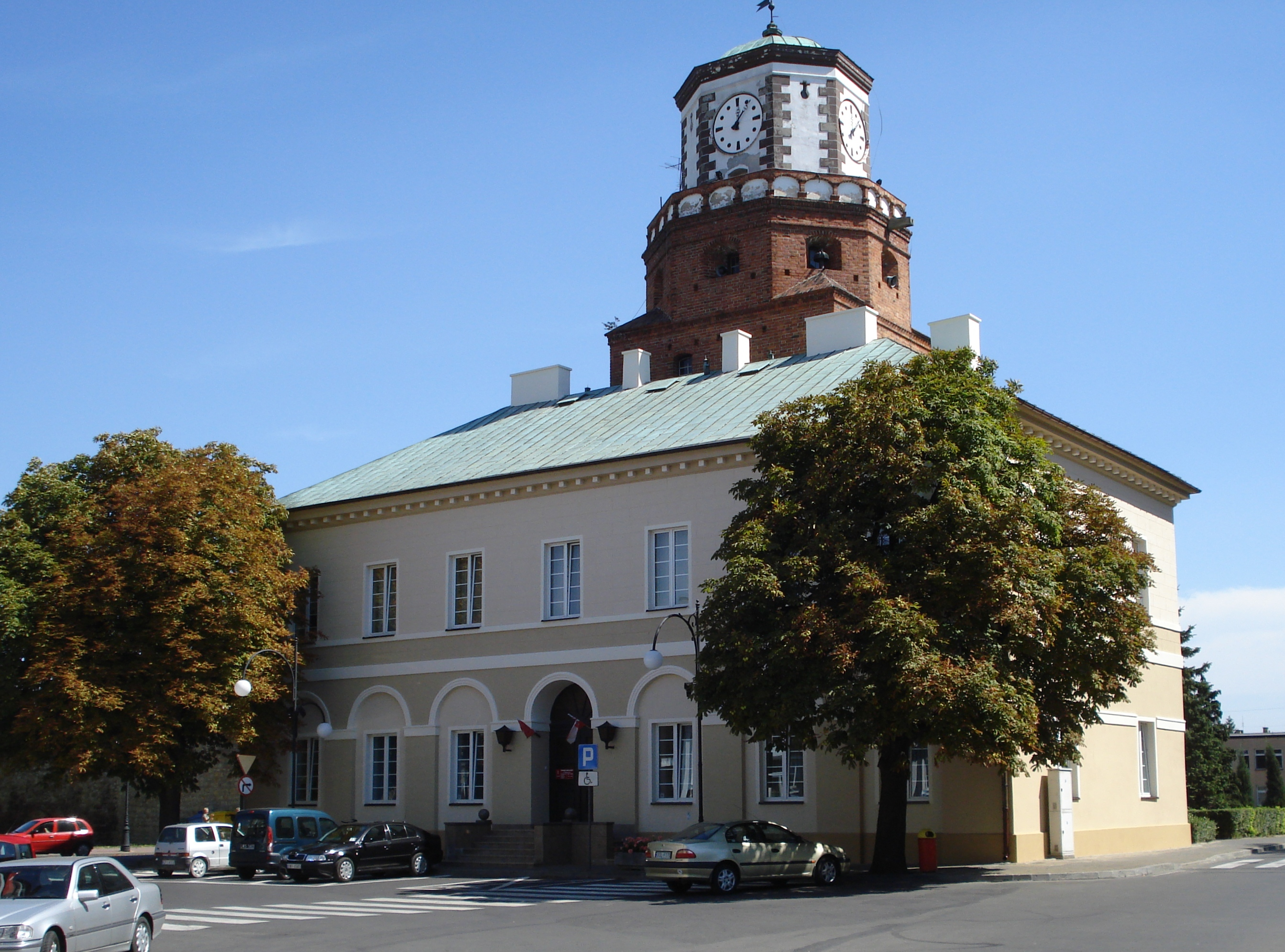 Ratusz i Brama Krakowsk